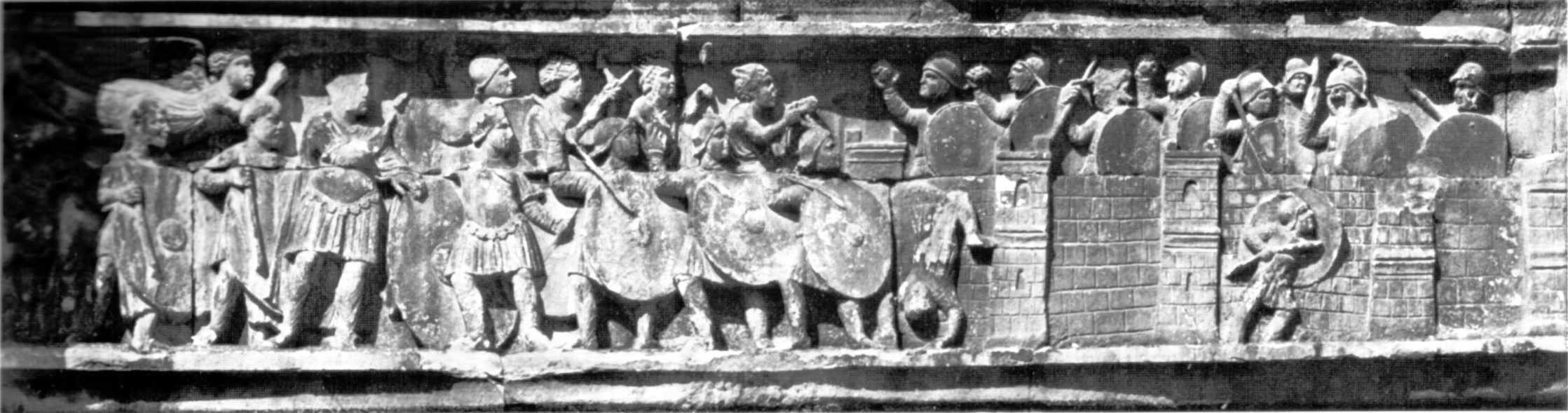 Frise représentant l'assaut sur Vérone. Arc de Constantin, Rome.